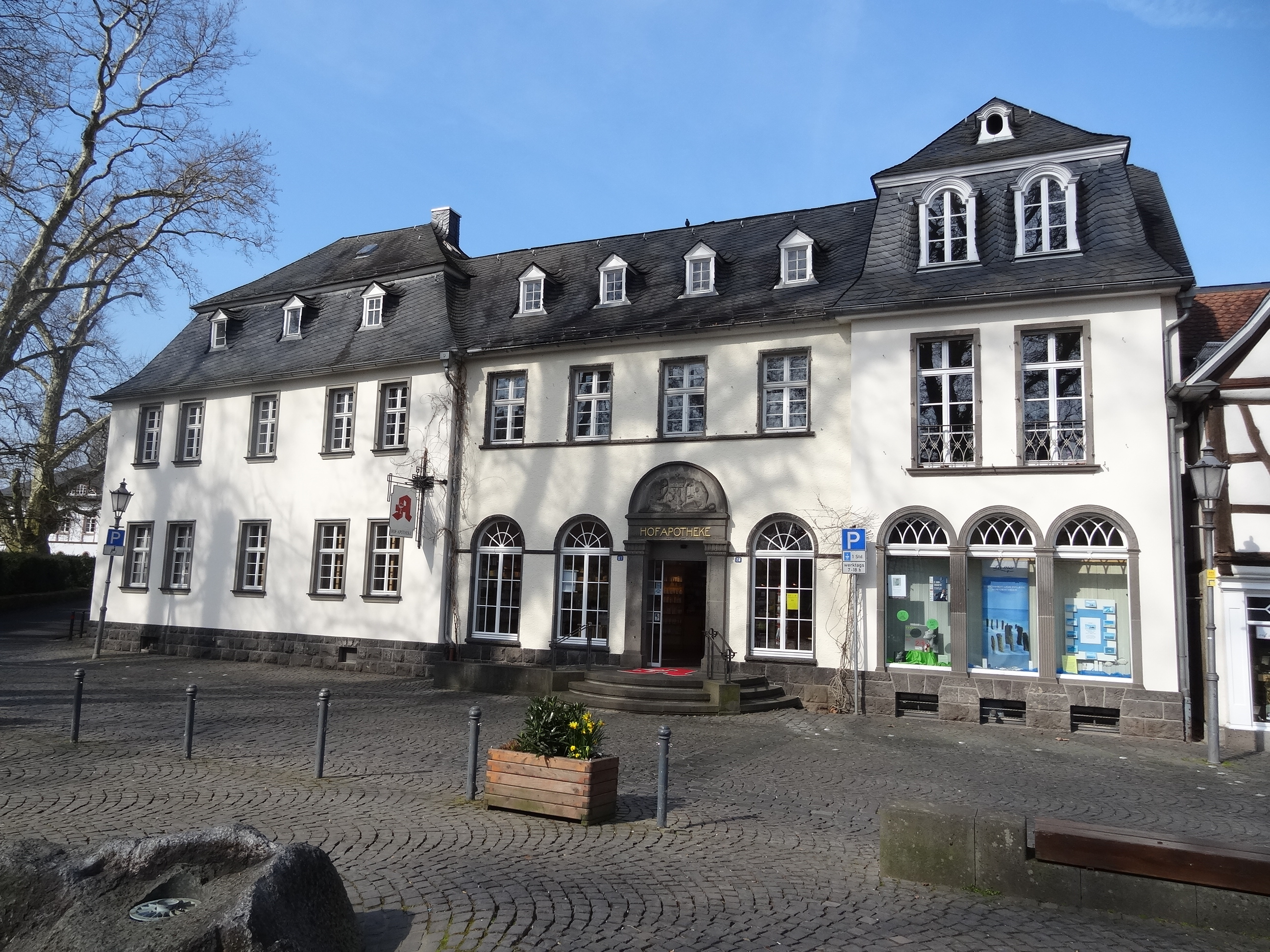 Unterstadt 23, 25, 27 (Lich)